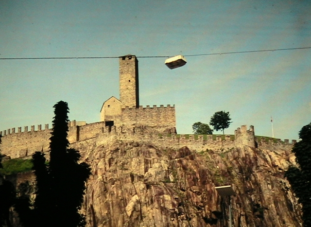 Fotis: Ella Strug, 19-24/5/2005. Donis permeson por kopii la diapozitivon por publikigo en Vikipedio al Biciklanto